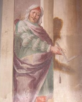 Ritratto di Francesco Richini nella Villa Frisiani Mereghetti Maggi a Corbetta (MI) - Italia